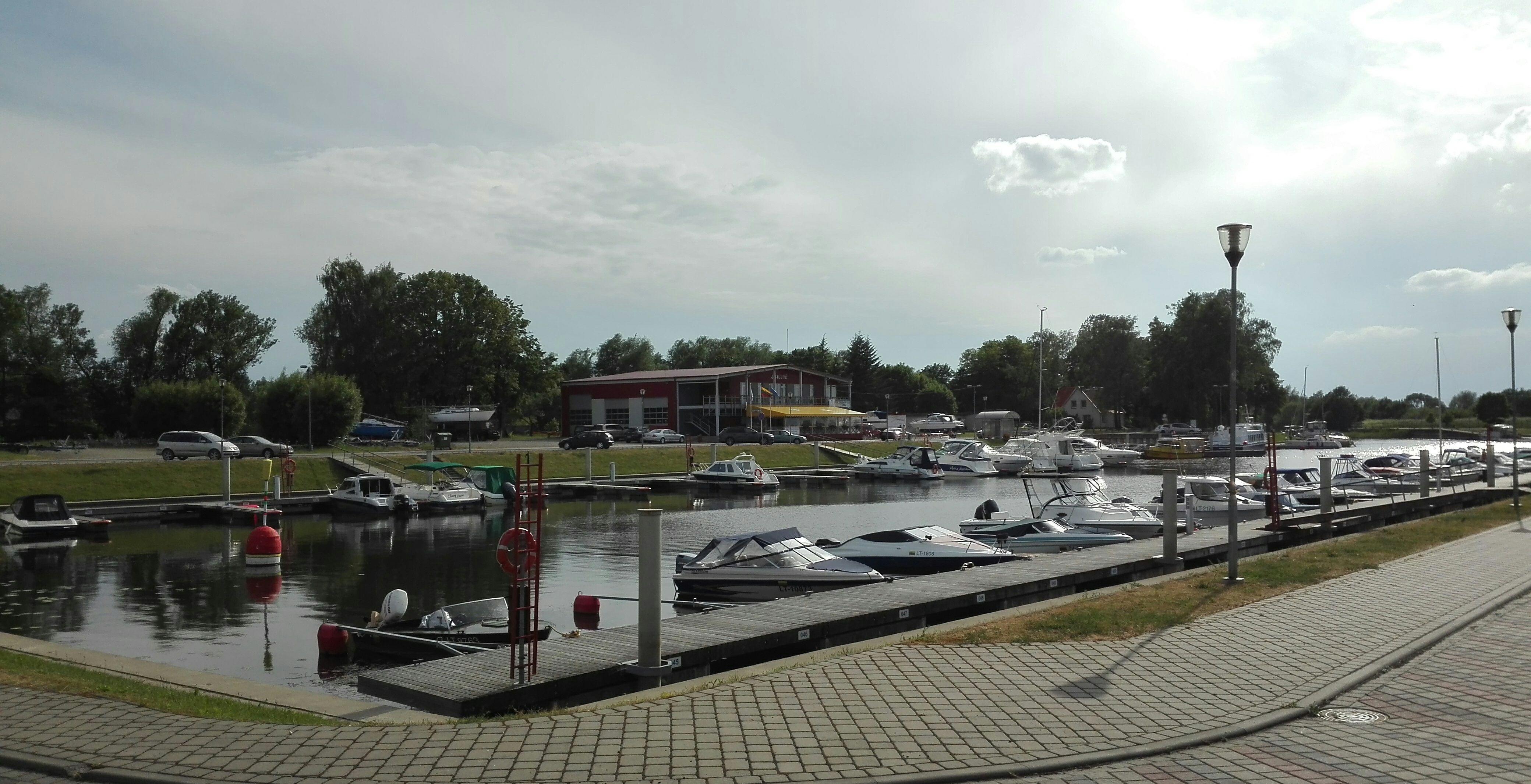 Šilutės mažųjų laivų uostas